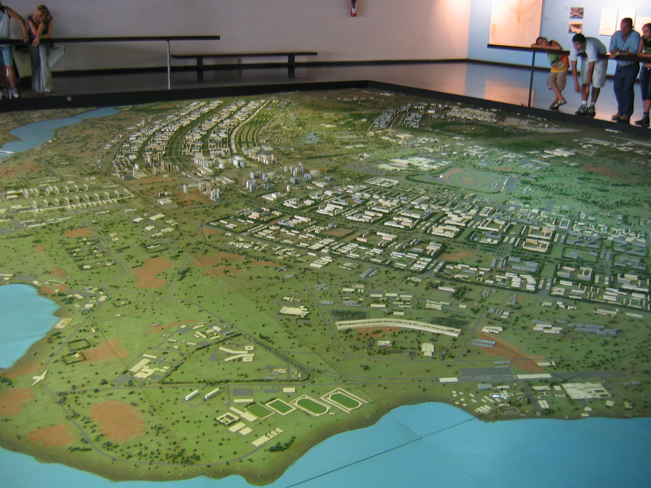 A Model of Brasília